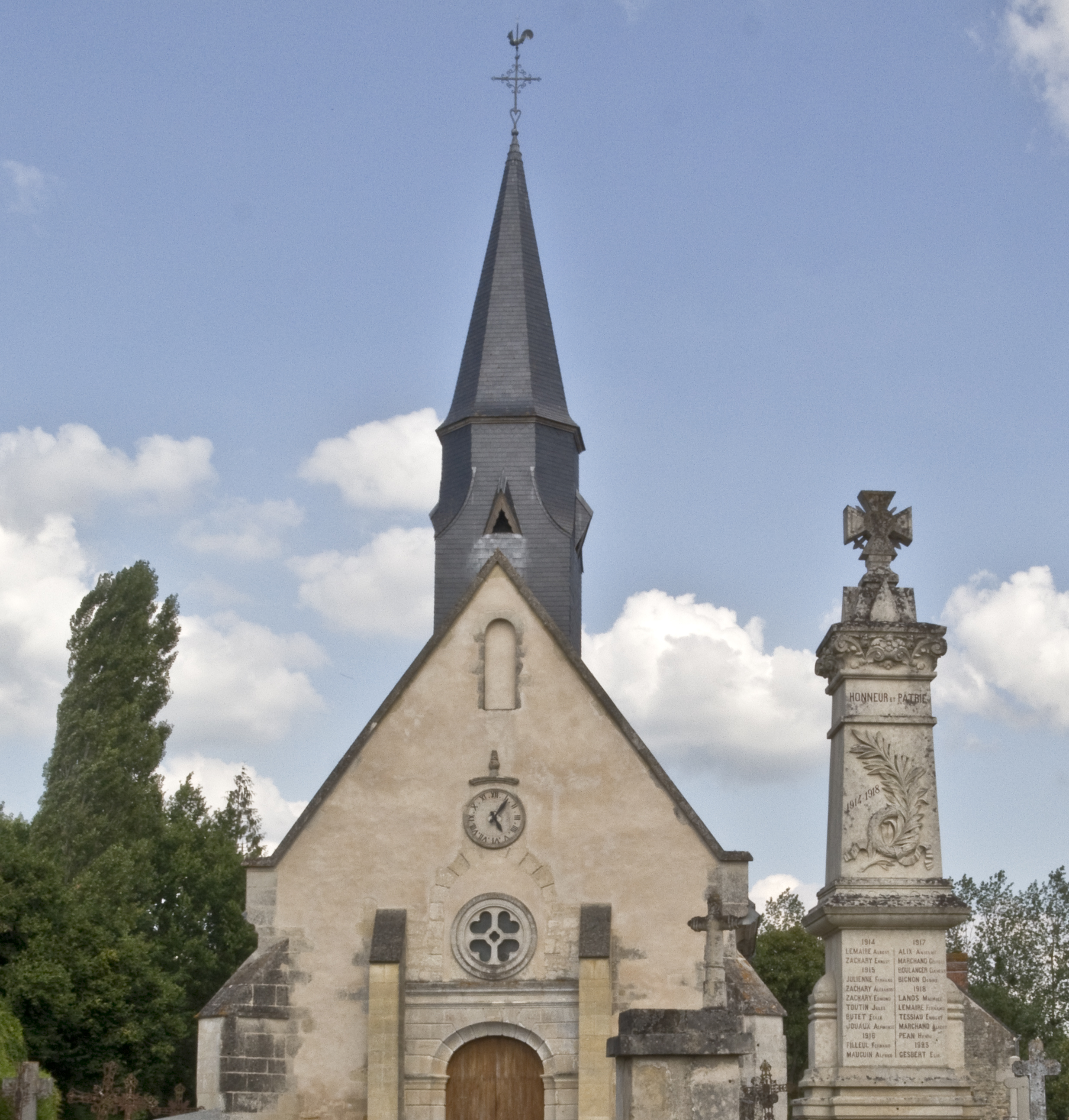 église de la Trinité, monument aux morts, Roullée, Villeneuve-en-Perseigne, 72600, France